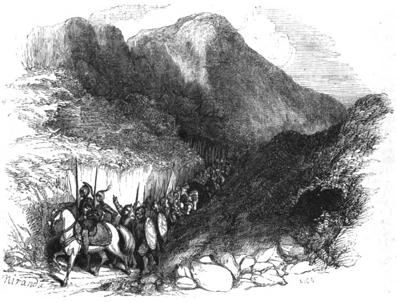 La hueste española encabezada por Francisco Pizarro cruzando los Andes peruanos, año 1533. Grabado que aparece en la obra de William Prescott, edicon española de 1851